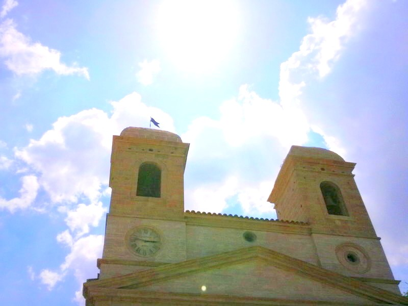 chiesa madre di celle san vito